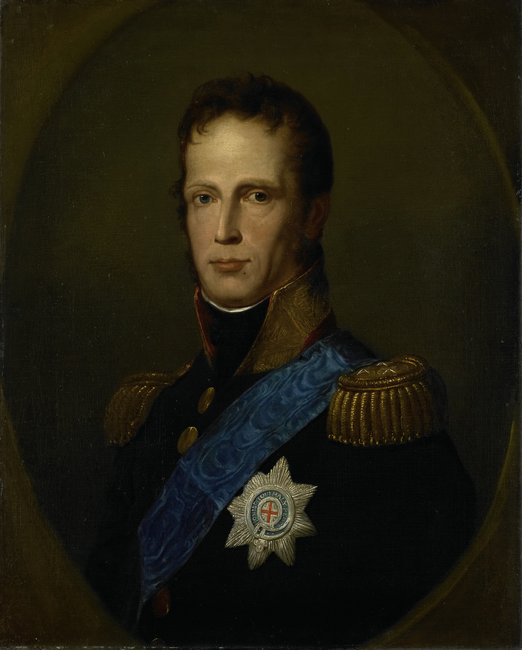 Portret van Willem I (1772-1843), souverein vorst der Verenigde Nederlanden, later koning der Nederlanden. Buste in ovaal, aanziend. Gedecoreerd met ster en lint van de Orde van de Kouseband.